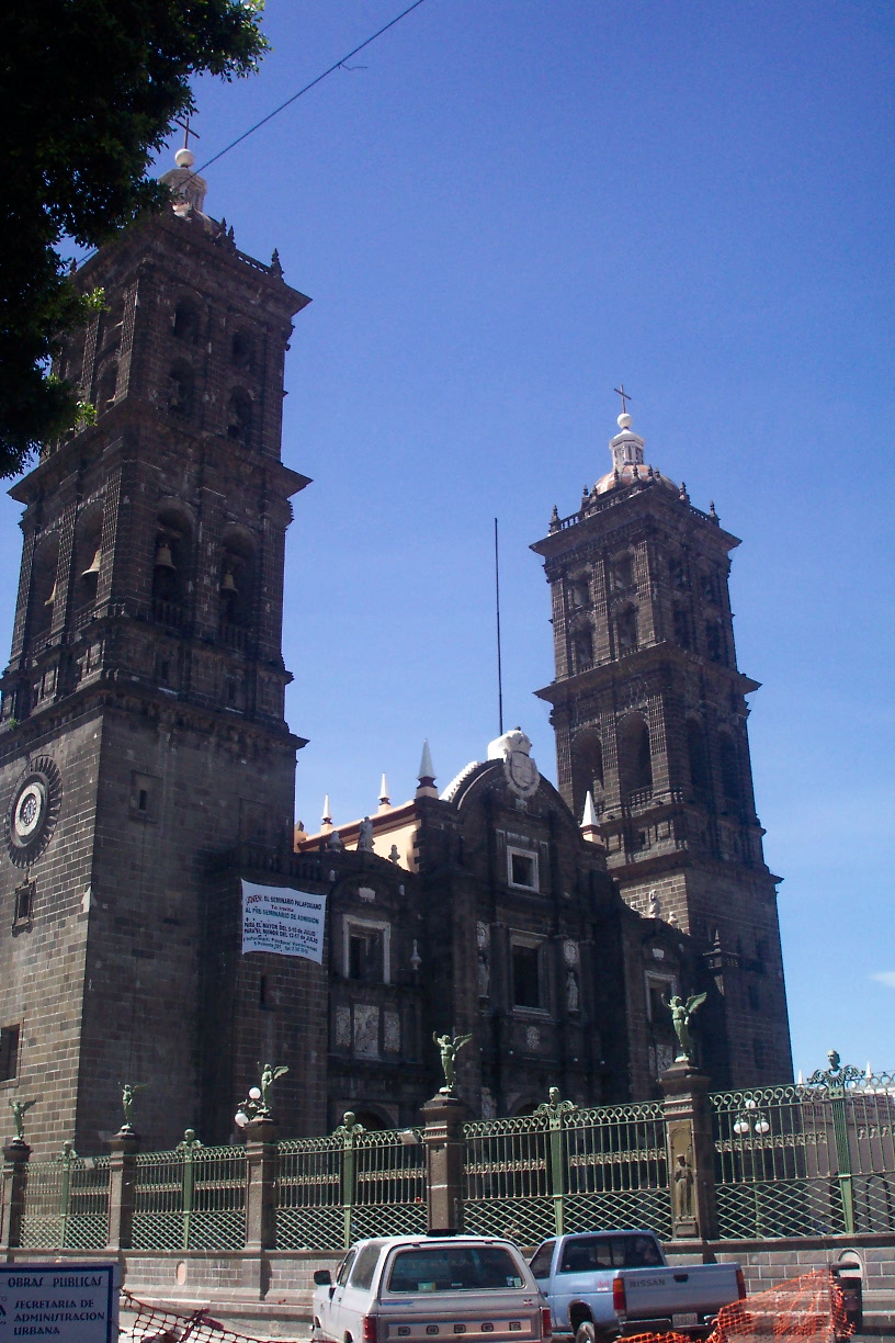 Catedral de Puebla. Foto Propia Salvador Barrera Rodriguez. Julio 2004. (Author's own work)